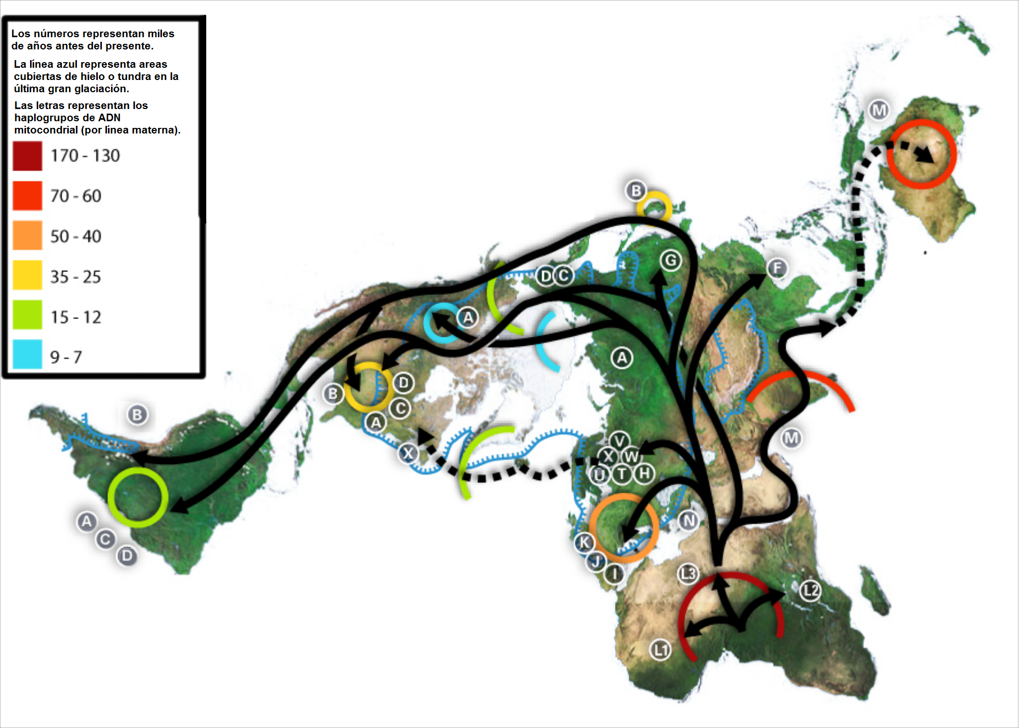 Mapa de las migraciones humanas en la prehistoria